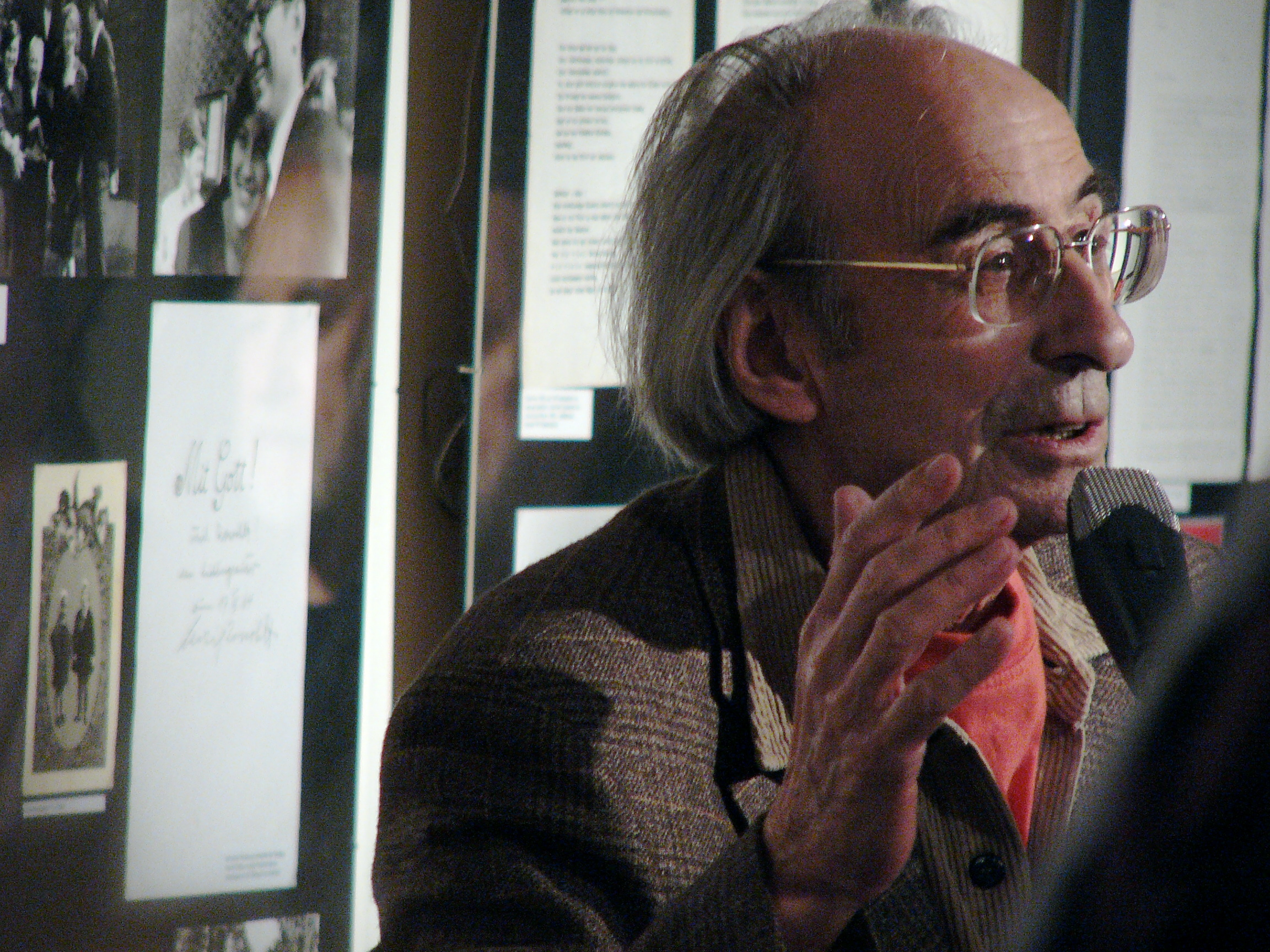 Peter Rühmkorf bei einer Ansprache anlässlich einer Ausstellungseröffnung im Museum für Kunst und Gewerbe, Hamburg 2004